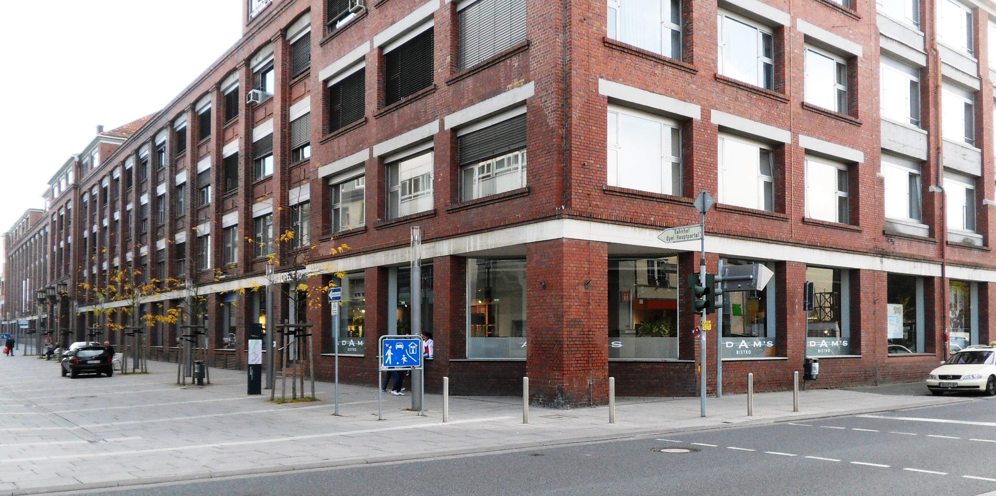 An der Ecke Marktstraße/Weisenauer Straße ragt das Opelwerk am weitesten hinein in das Stadtzentrum von Rüsselsheim am Main. Am linken Bildrand befindet sich das Opel-Hauptportal. An der Stra0enecke sind neben Adam’s Bistro einige dem Publikum zugängliche Ausstellungsflächen.